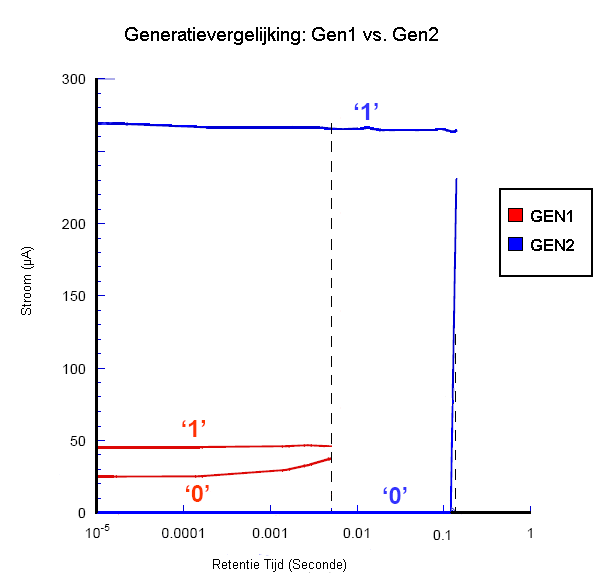 Gen 1 tov Gen2